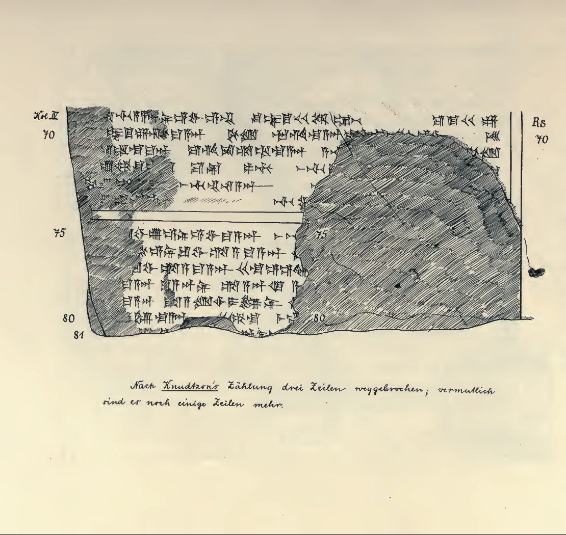 List Tuszratty do Amenhotepa III w języku huryckim – autografia.